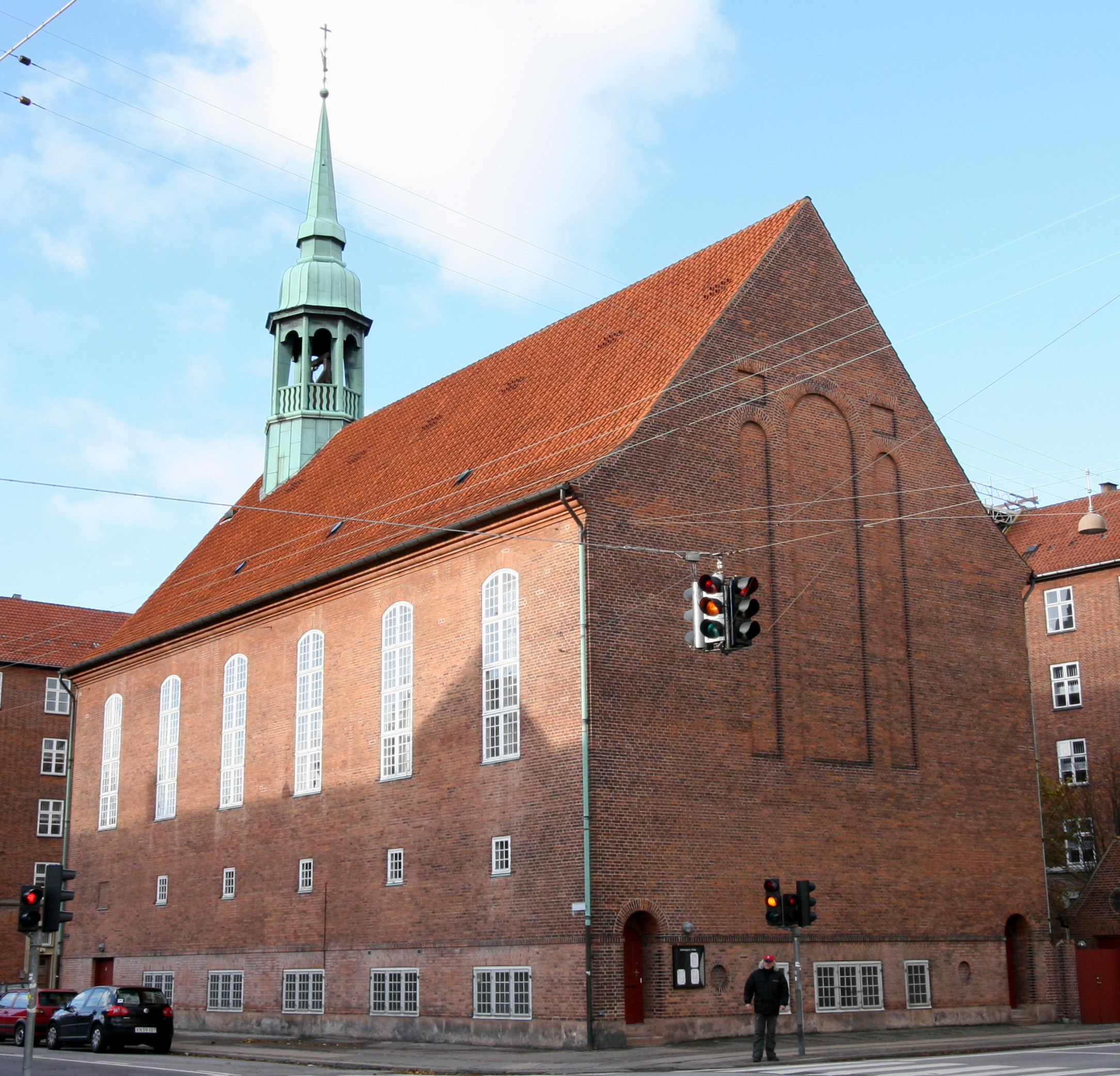 Allehelgens Kirke, Copenhagen, Denmark.